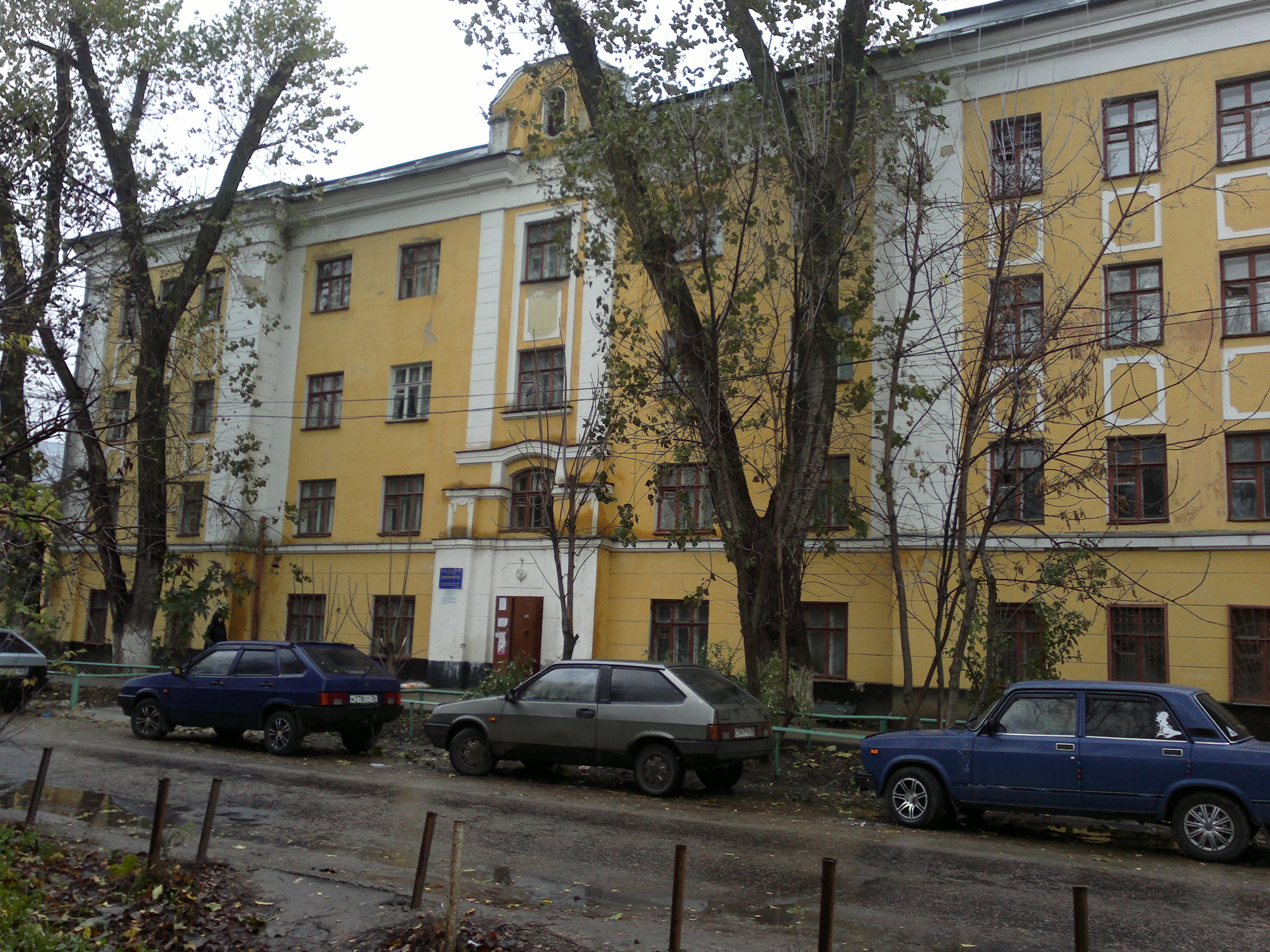 общежитие №3 ВГАУ 31 октября 2012 года